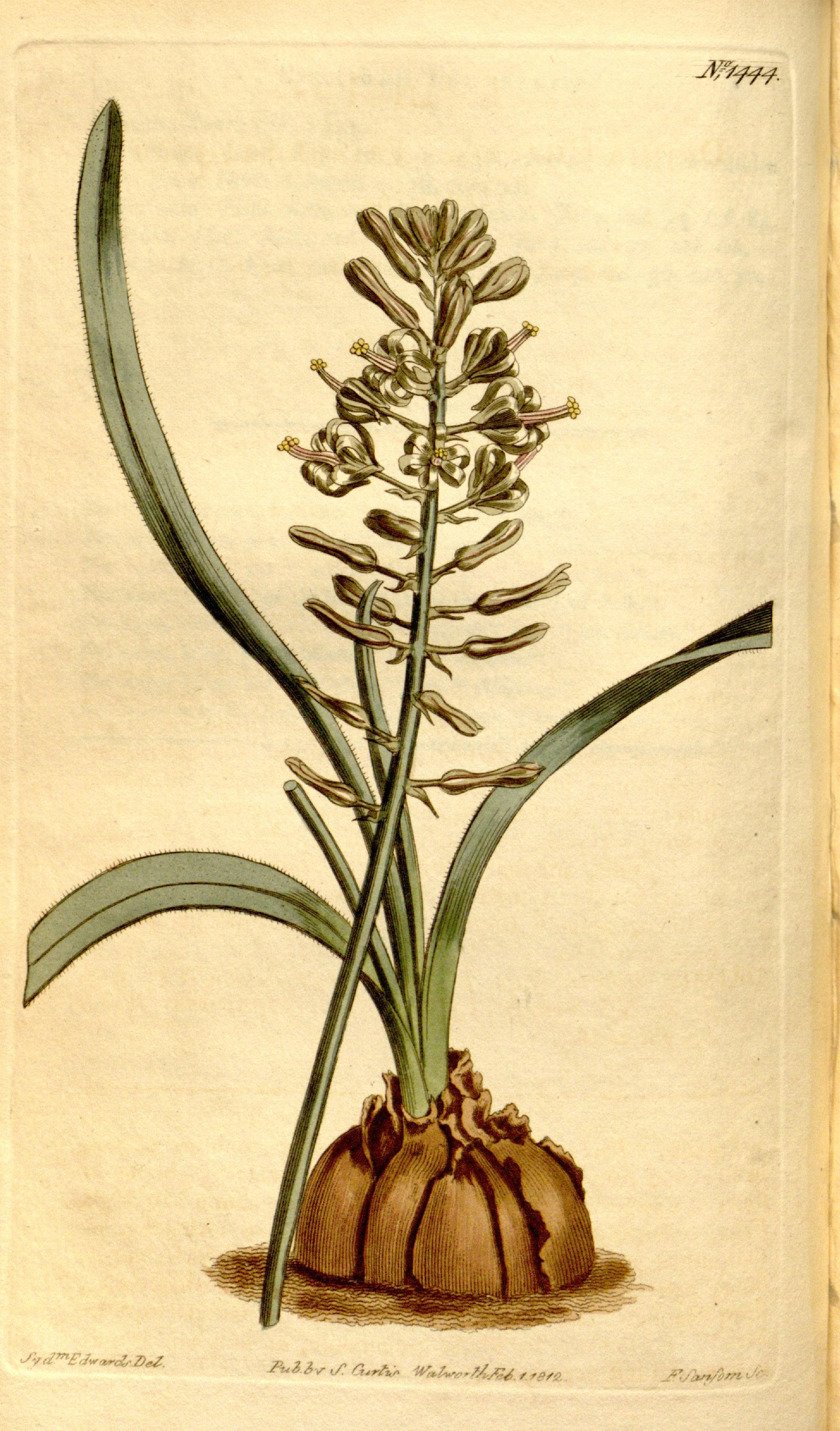 Jfcfff